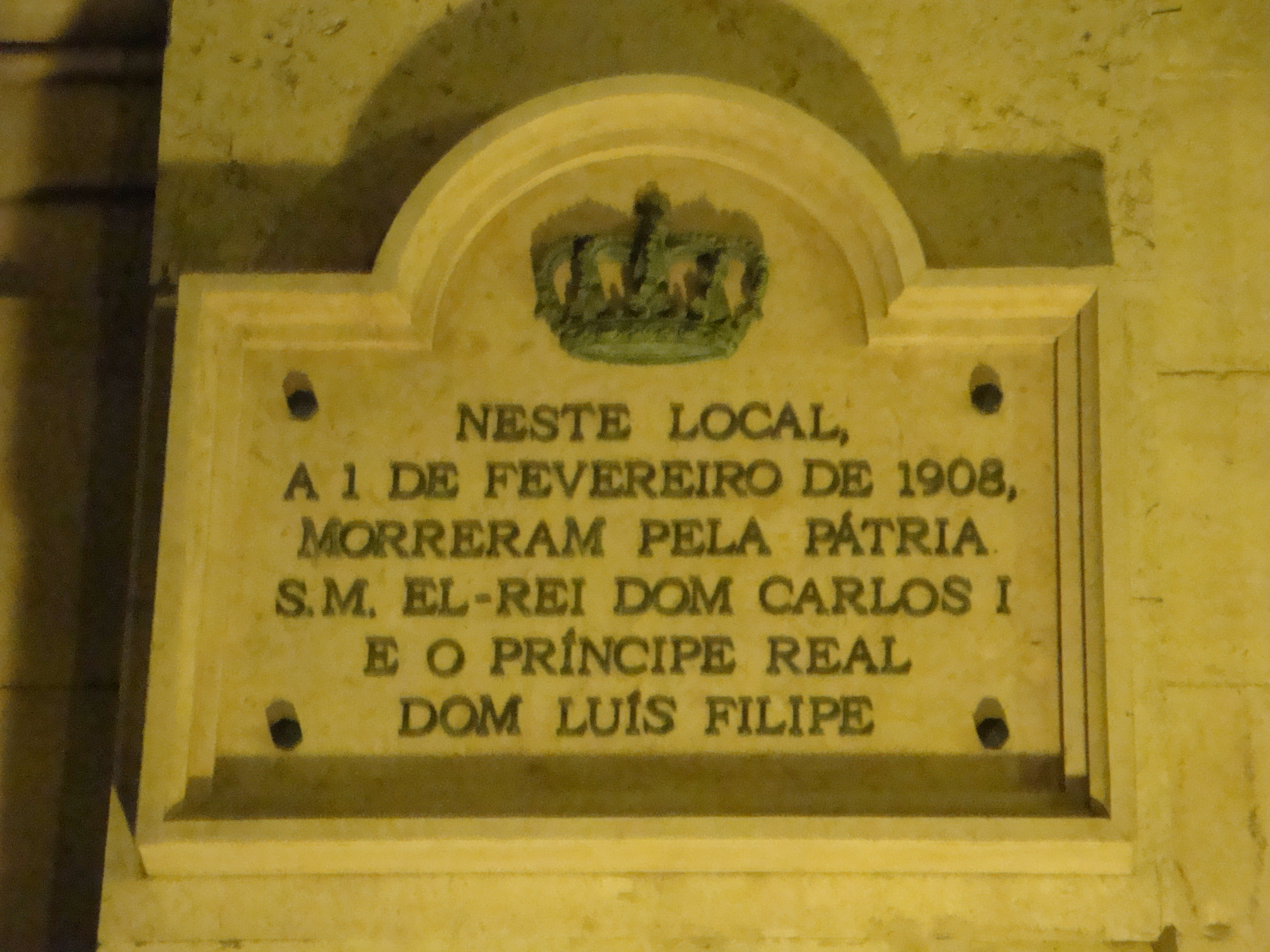 Placa evocativa do regicídio, no Terreiro do Paço, em Lisboa